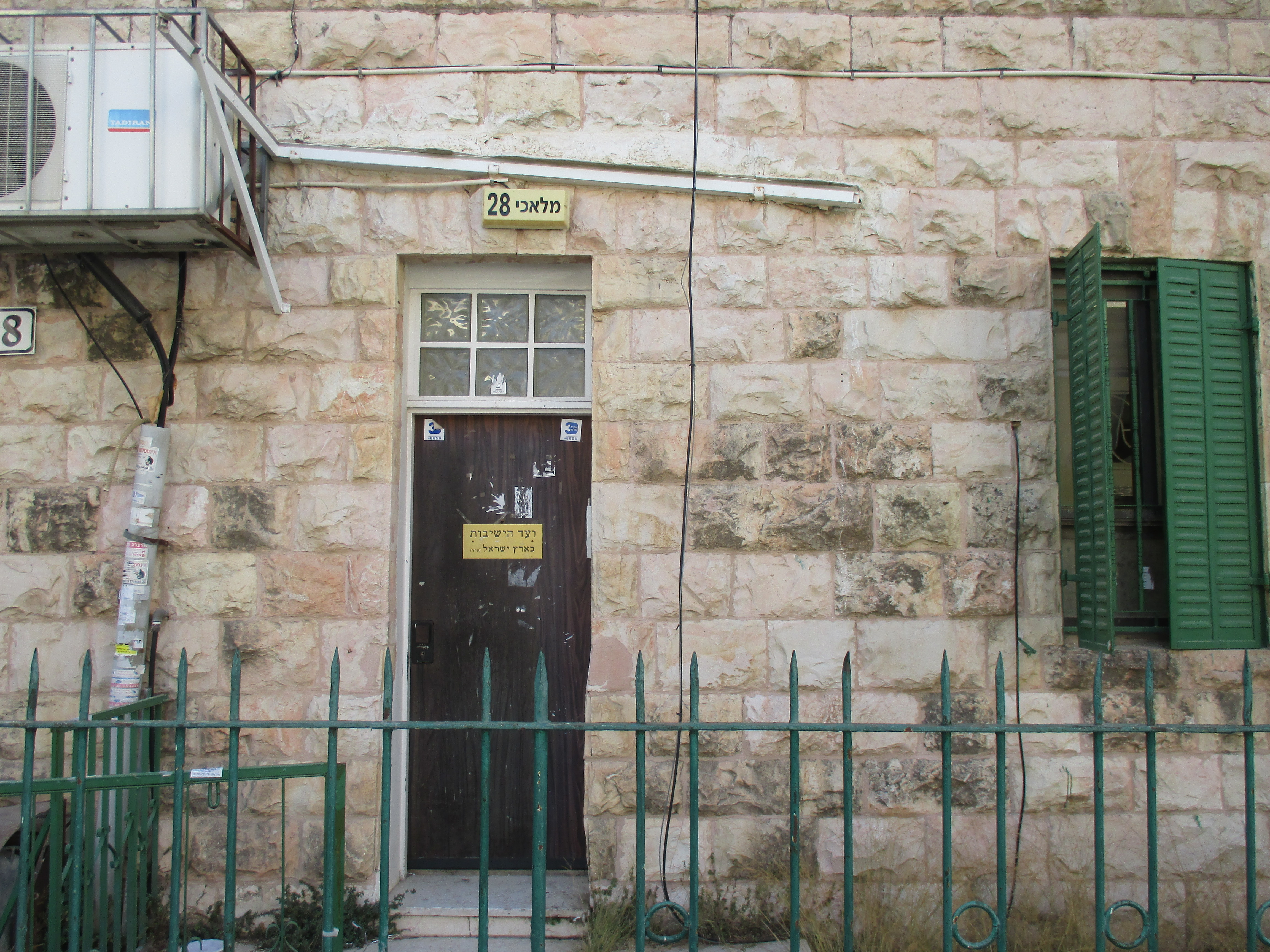 משרדי ועד הישיבות ברחוב מלאכי בירושלים